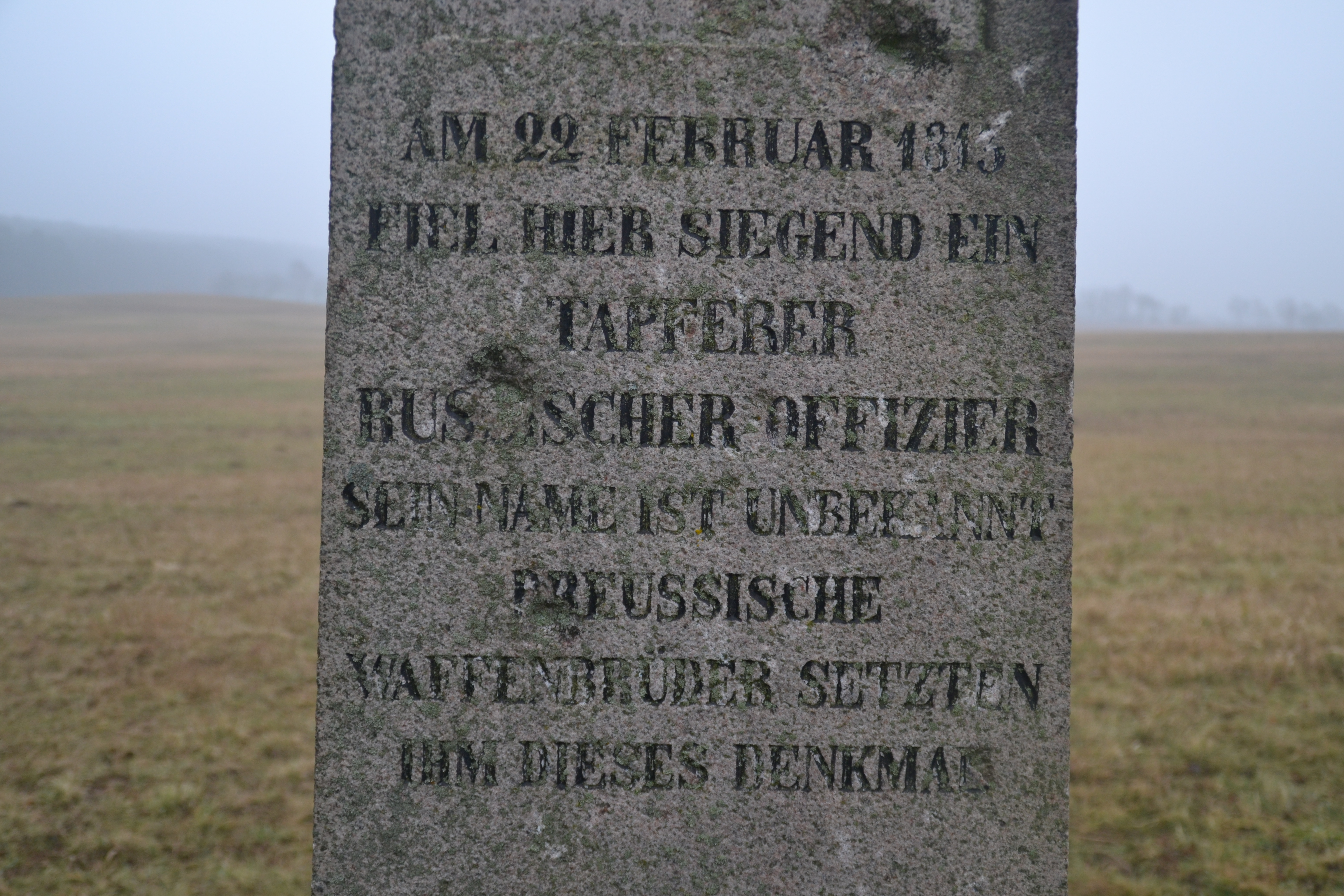 Gedenkstein für einen 1813 gefallenen russischen Offizier in Gölsdorf